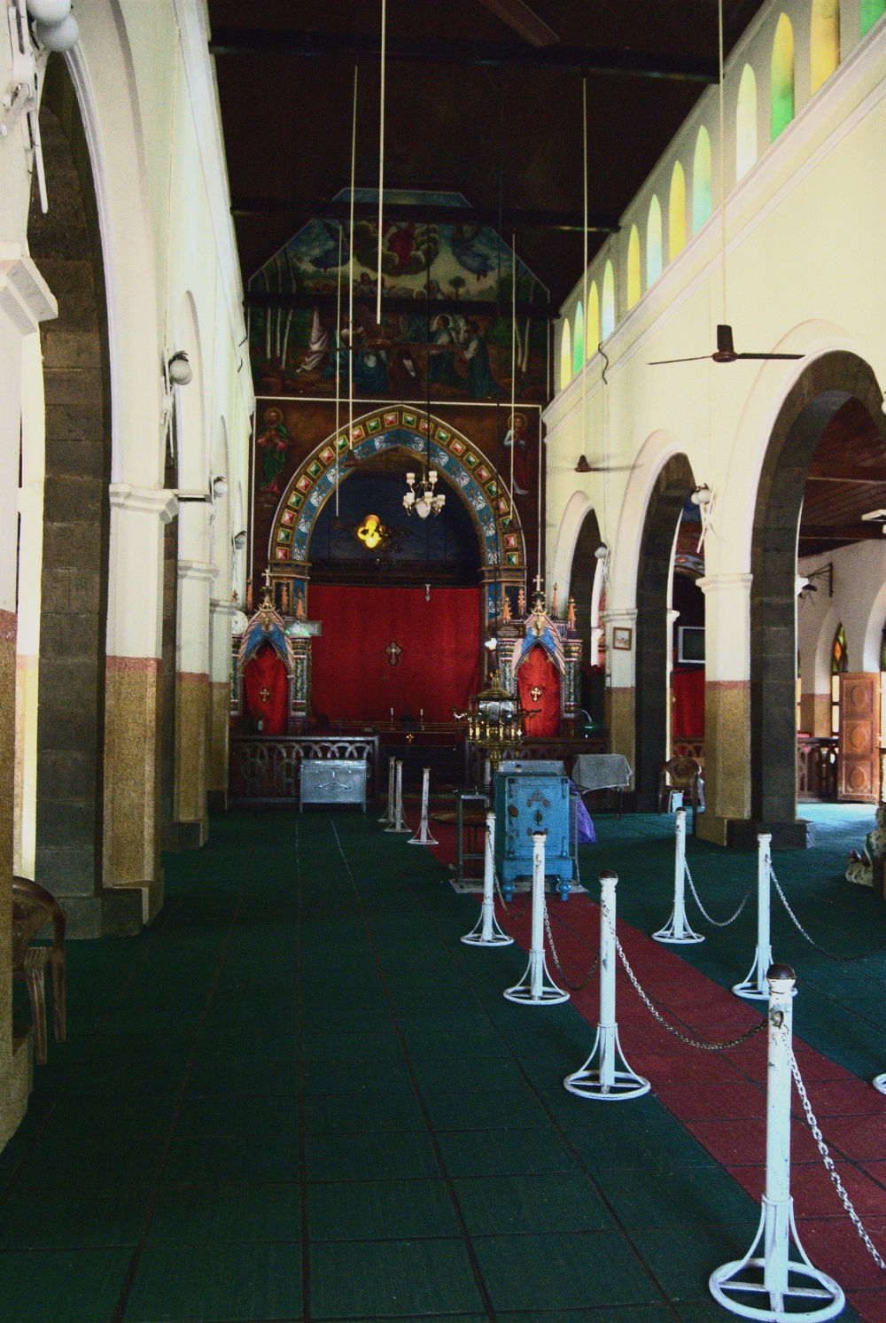 നിരണം പള്ളി - ആൾത്താര